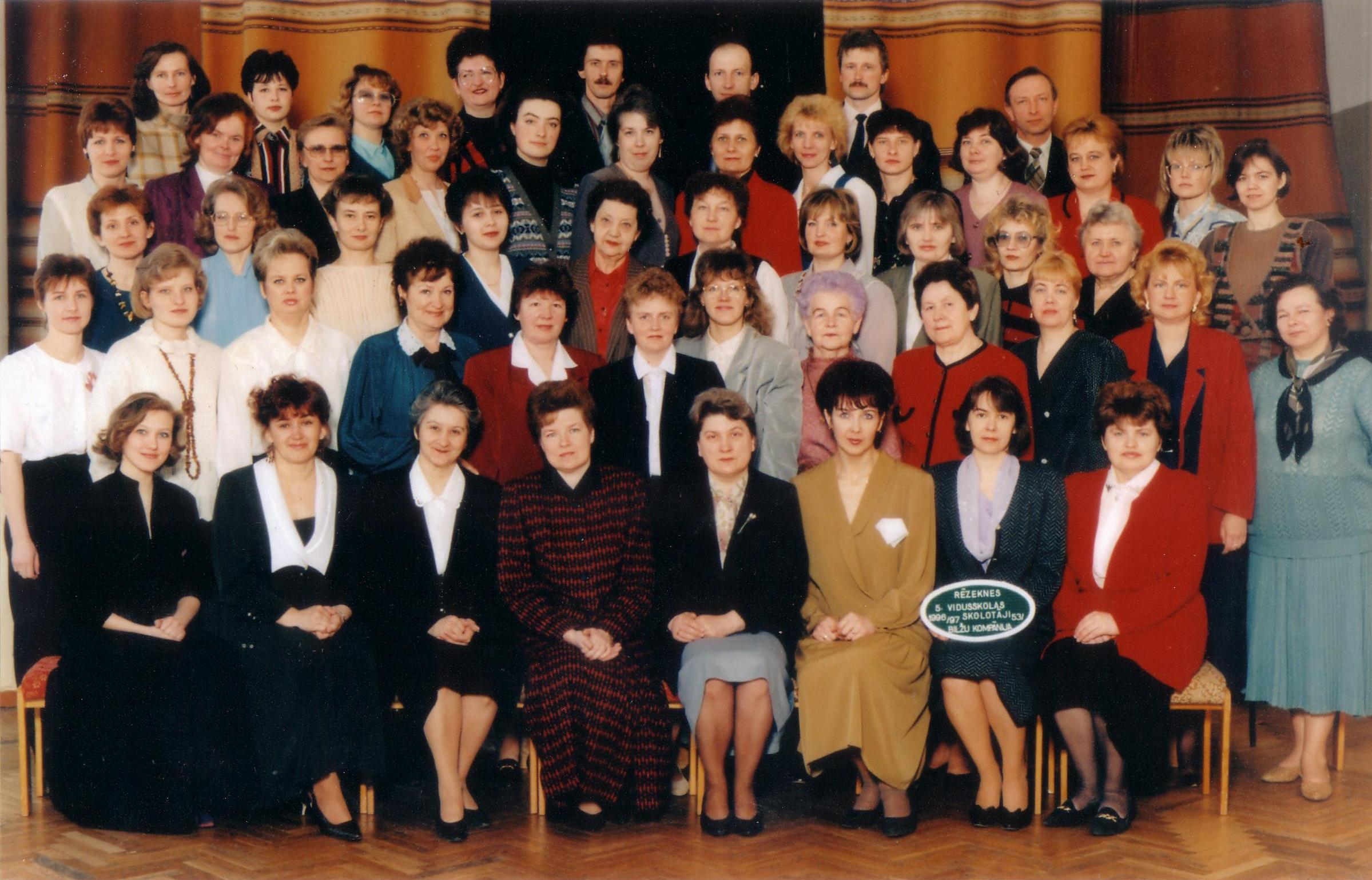 Rēzeknes 5. vidusskolas skolotāji 1997. / 1998. m.g.